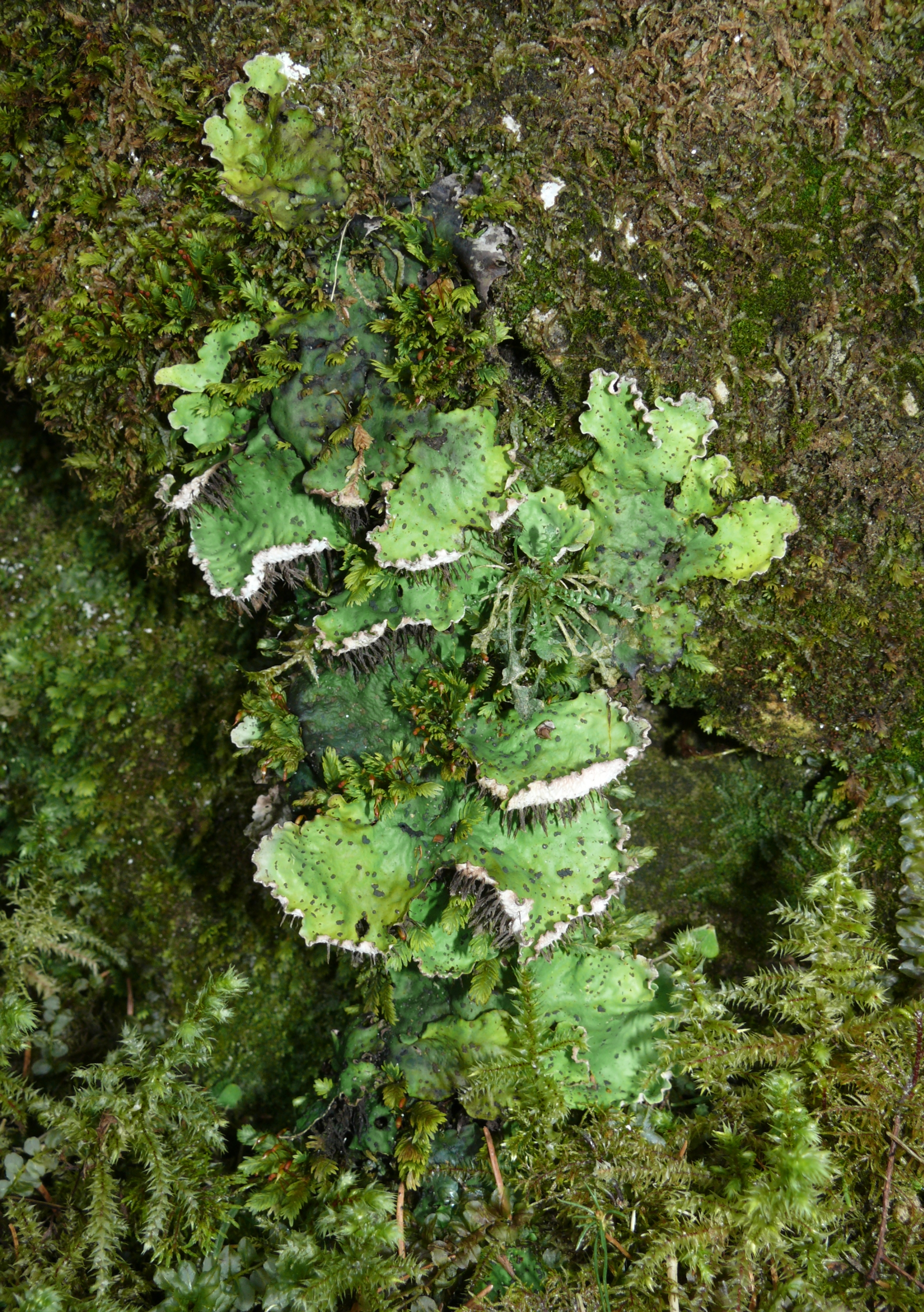 Peltigera leucophlebia, Schwäbische Alb, Germany